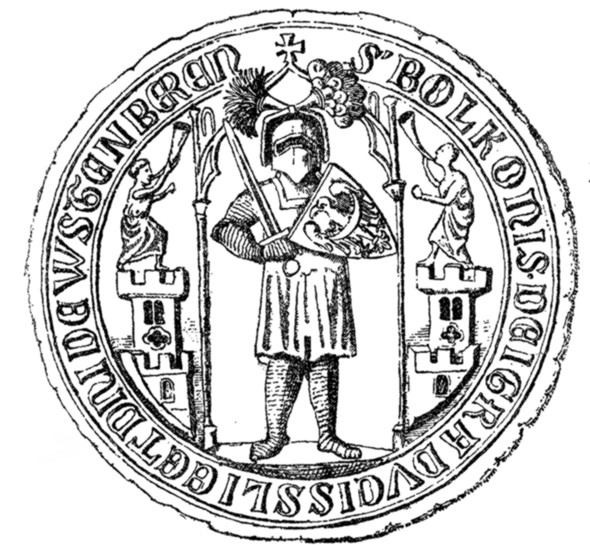 Bolko I Surowy seal